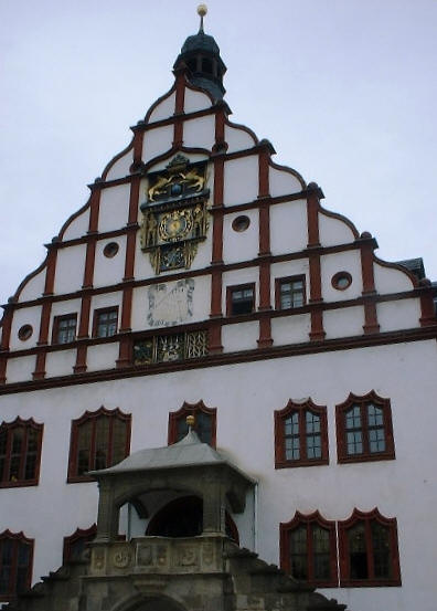 Das Alte Rathaus in Plauen, Foto: Acf 2003, Public Domain